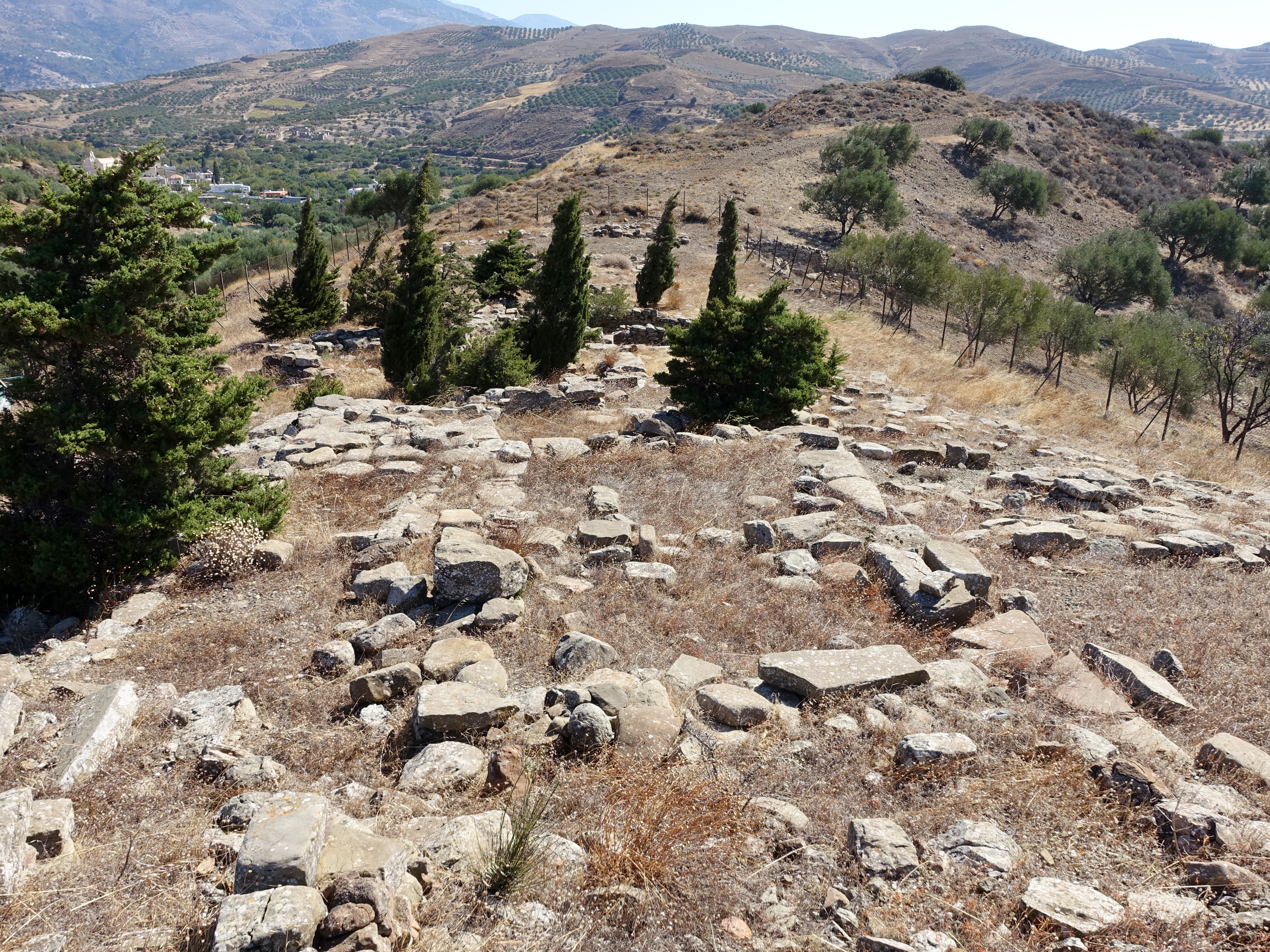 Ausgrabungsstätte von Kephala (Κεφάλα) bei Chondros (Χόνδρος), Gemeinde Viannos, Regionalbezirk Iraklio, Kreta, Griechenland